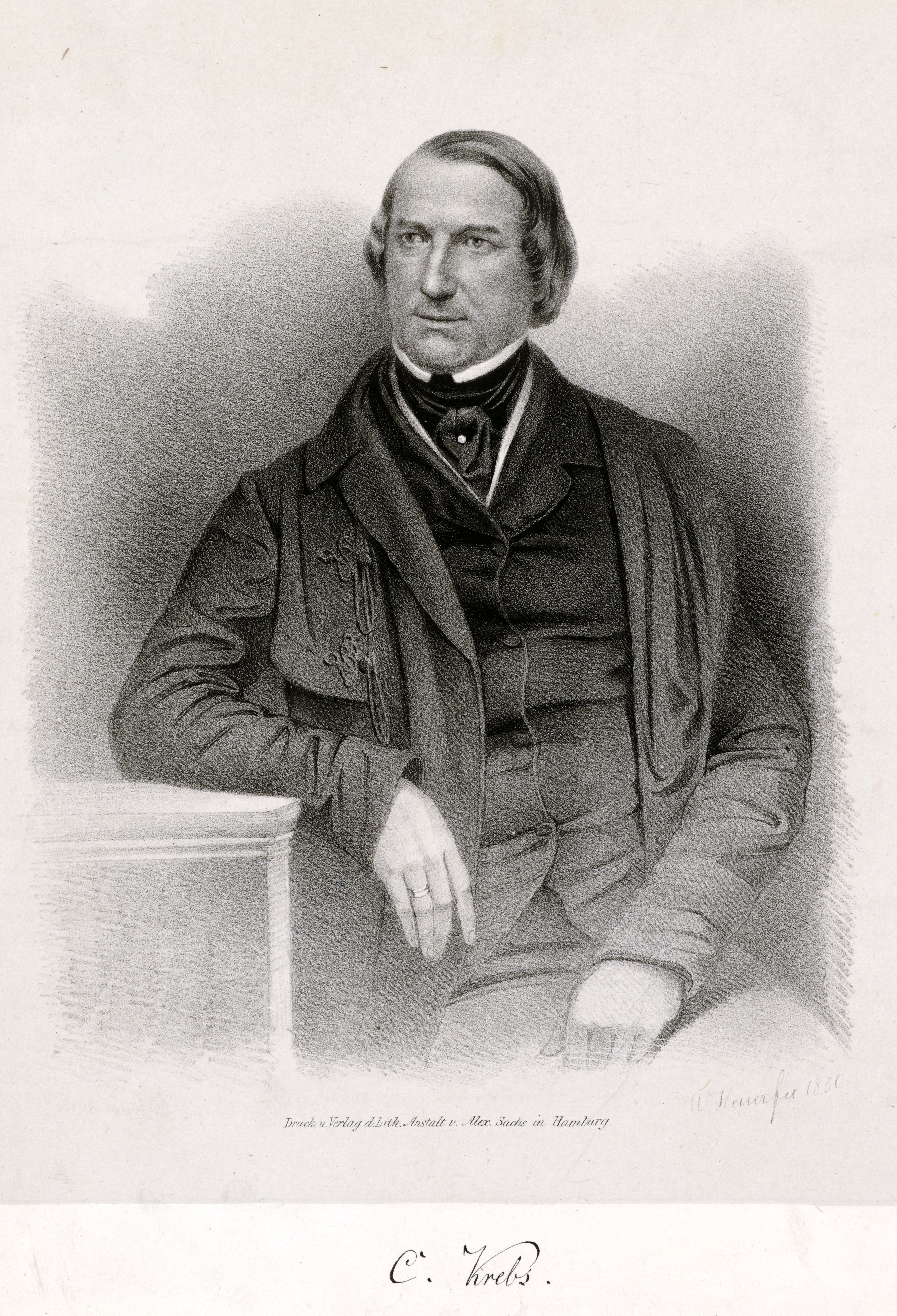 C. Krebs